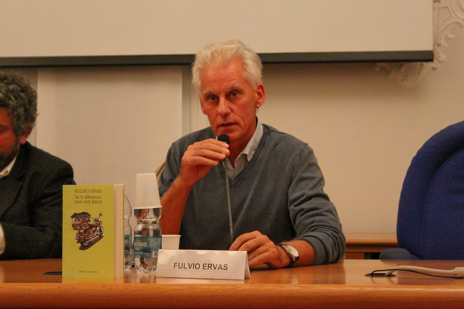 Fulvio Ervas